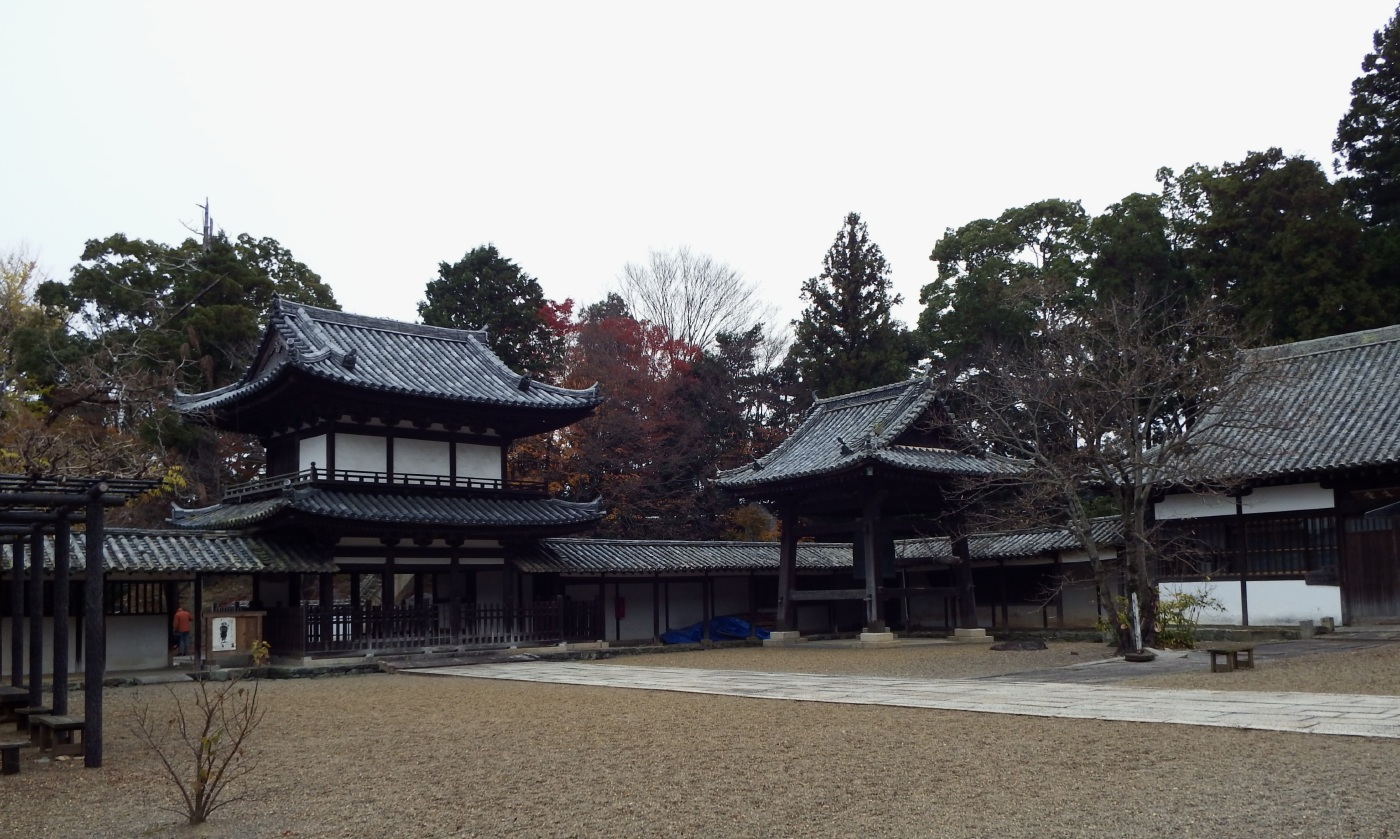 丈六寺の境内